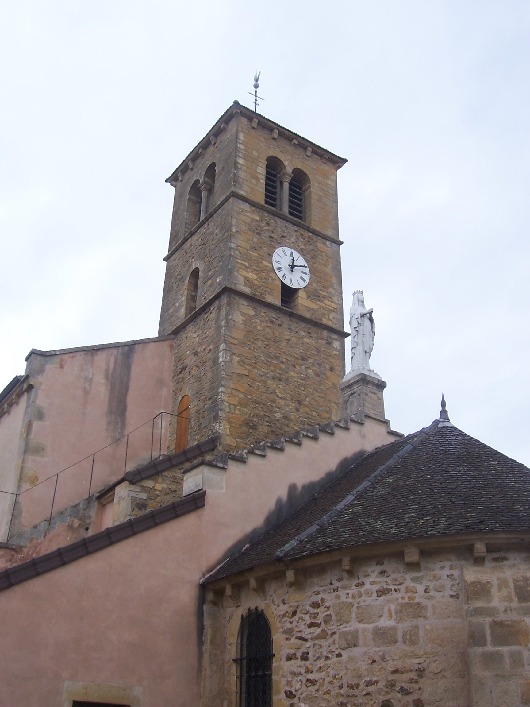 Eglise de Vauban